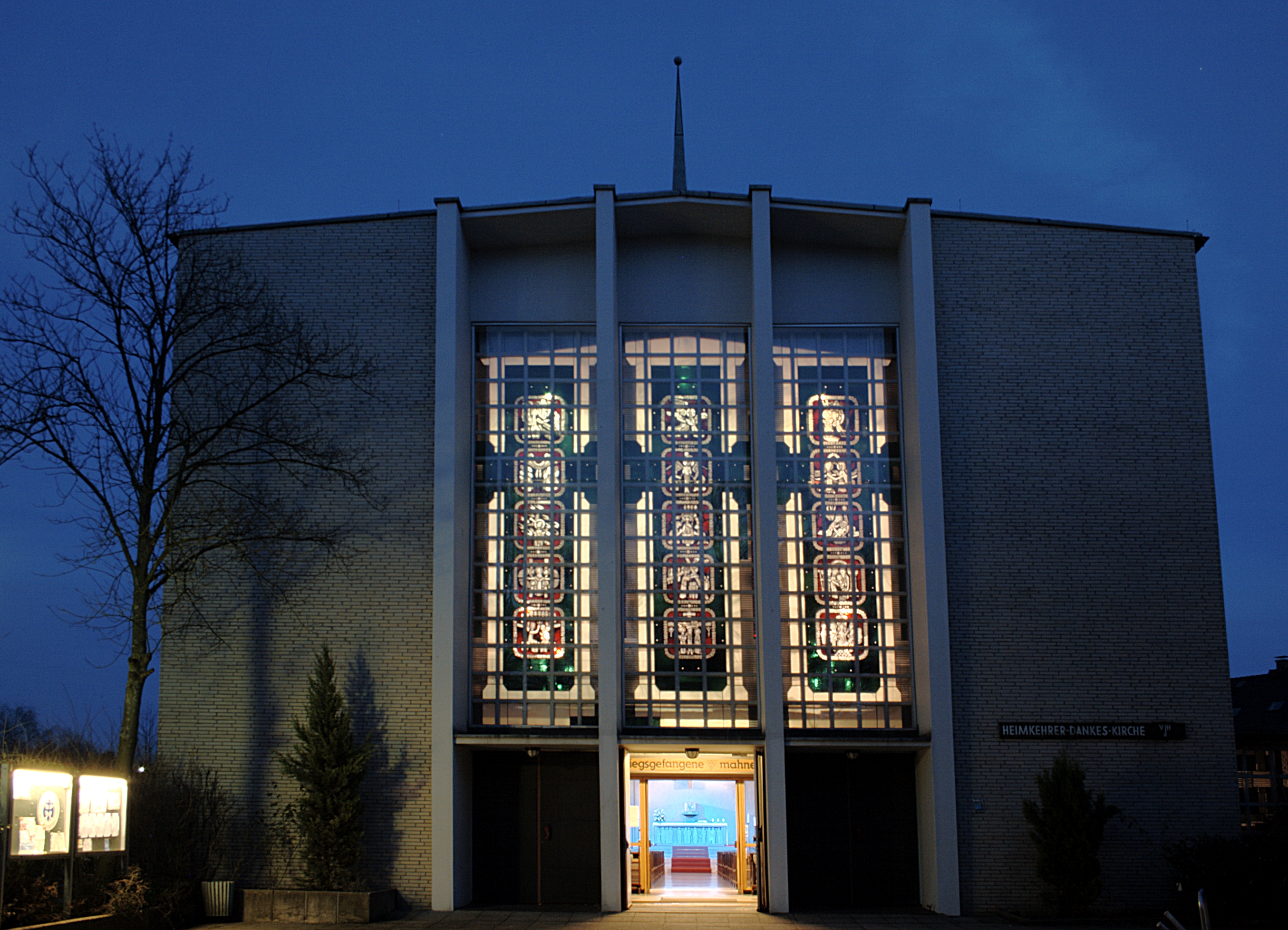 Katholische Kirche Heilige Familie, Bochum WeitmarThis is a photograph of an architectural monument., no. A 591